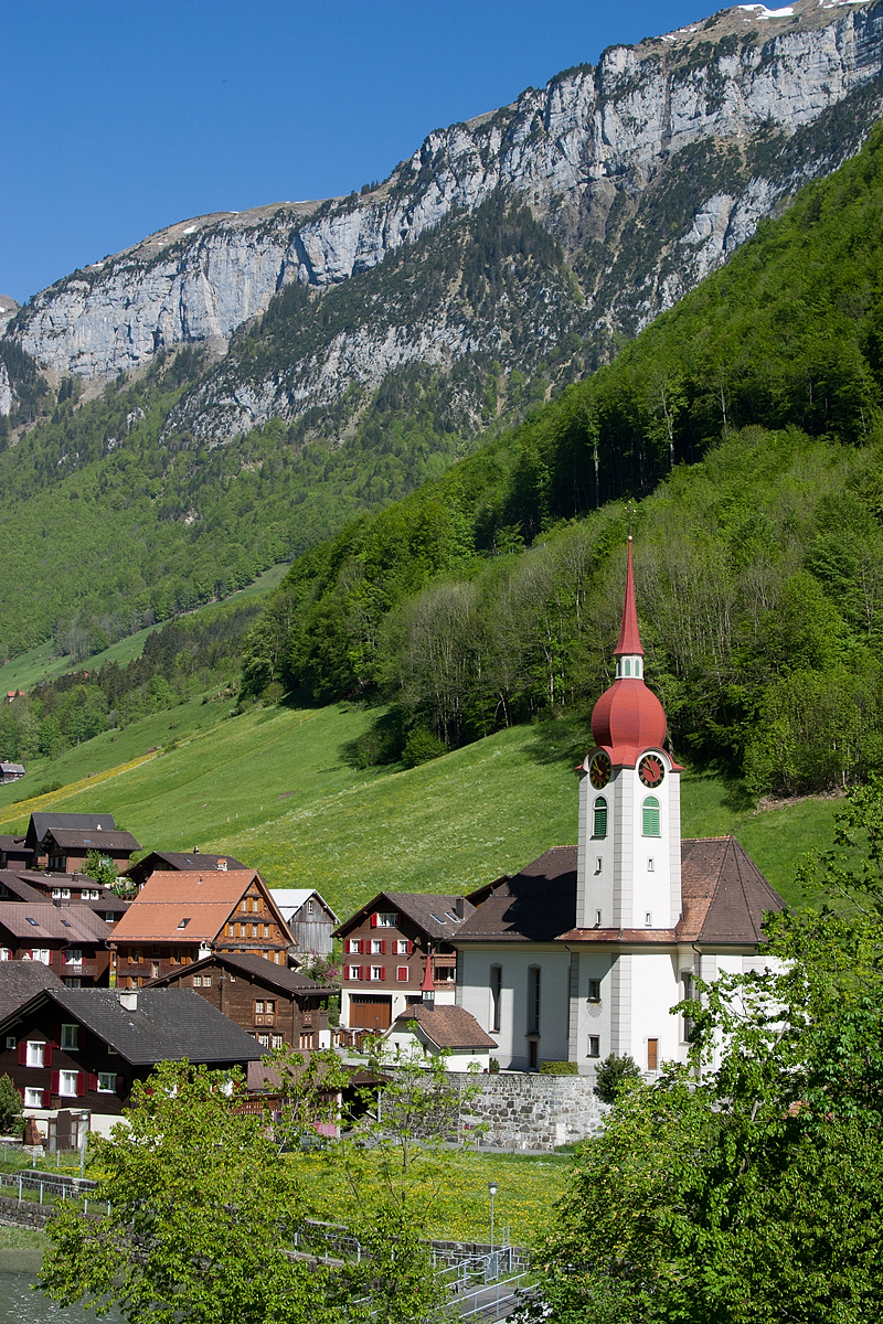 Katholische Kirche St. Theodul und Agathe in Isenthal (UR)